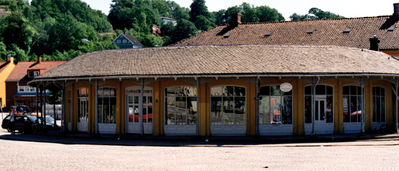 Basarene, Torget, Halden. Bygd 1882. Tegnet av stadsingeniør Kielland, oppført av arkitekt og byggmester Nils Nilsson